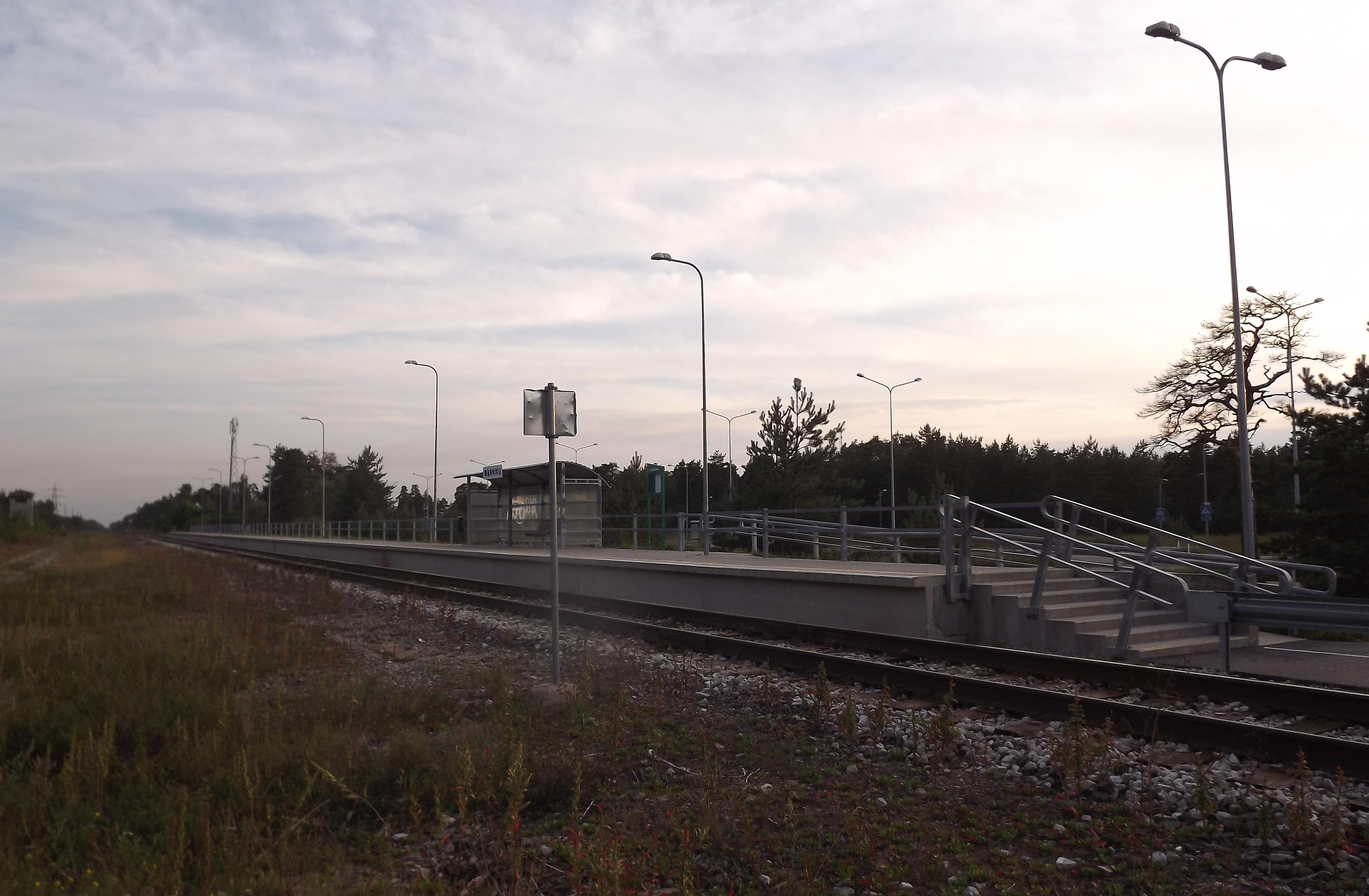 Männiku raudteepeatus